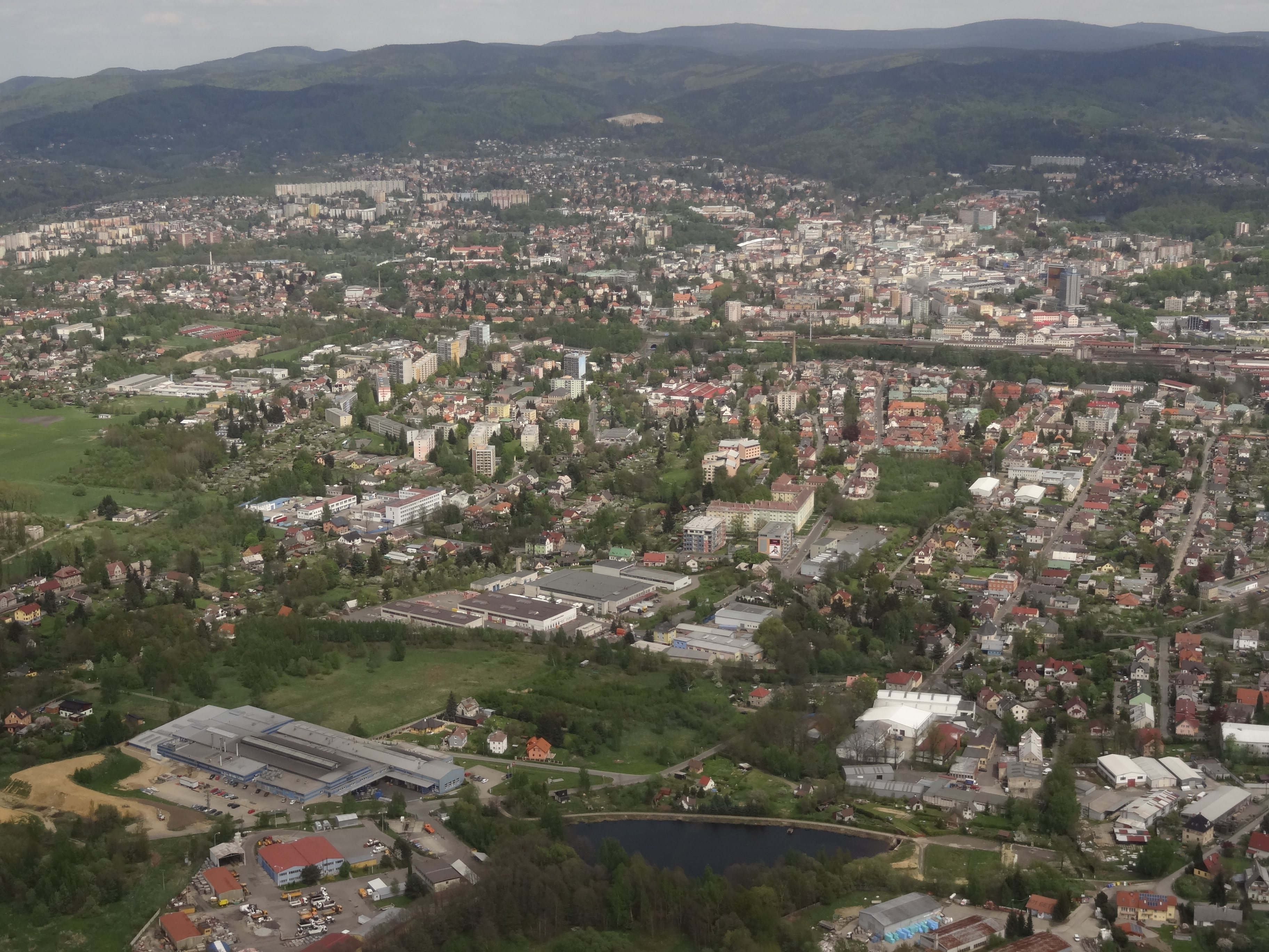 Liberec z letadla - v popředí Františkov, Jeřáb a Janův Důl, v pozadí střed města